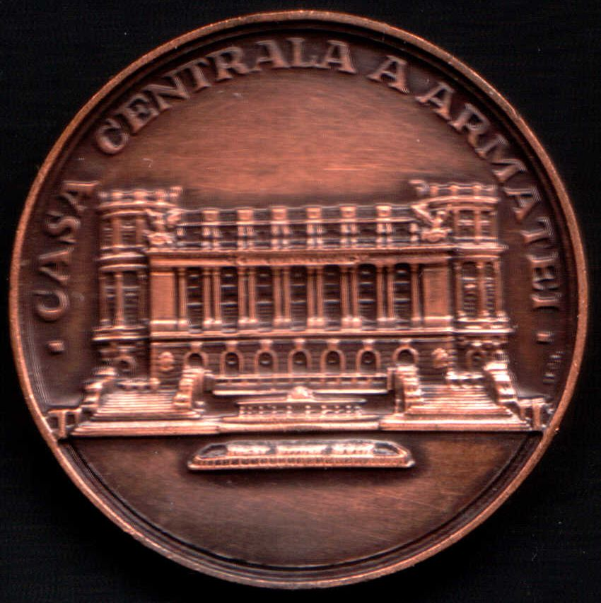 Medalie "Casa Centrală a Armatei" emisă în 1984 de Societatea Numismatică Română - Secția numismatică Casa centrală a Armatei.